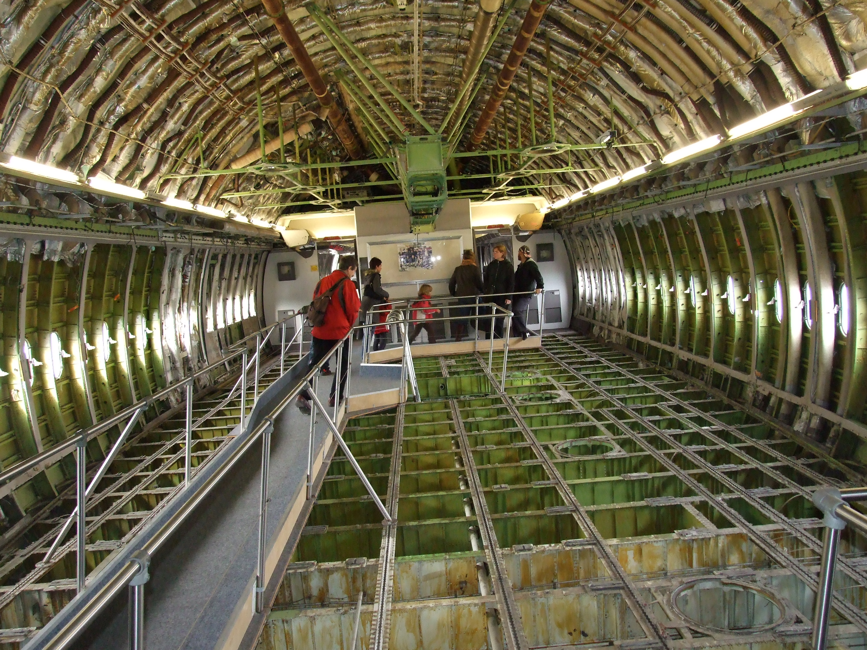 Boeing 747-230 Schleswig-Holstein in Technik Museum Speyer (Germany)